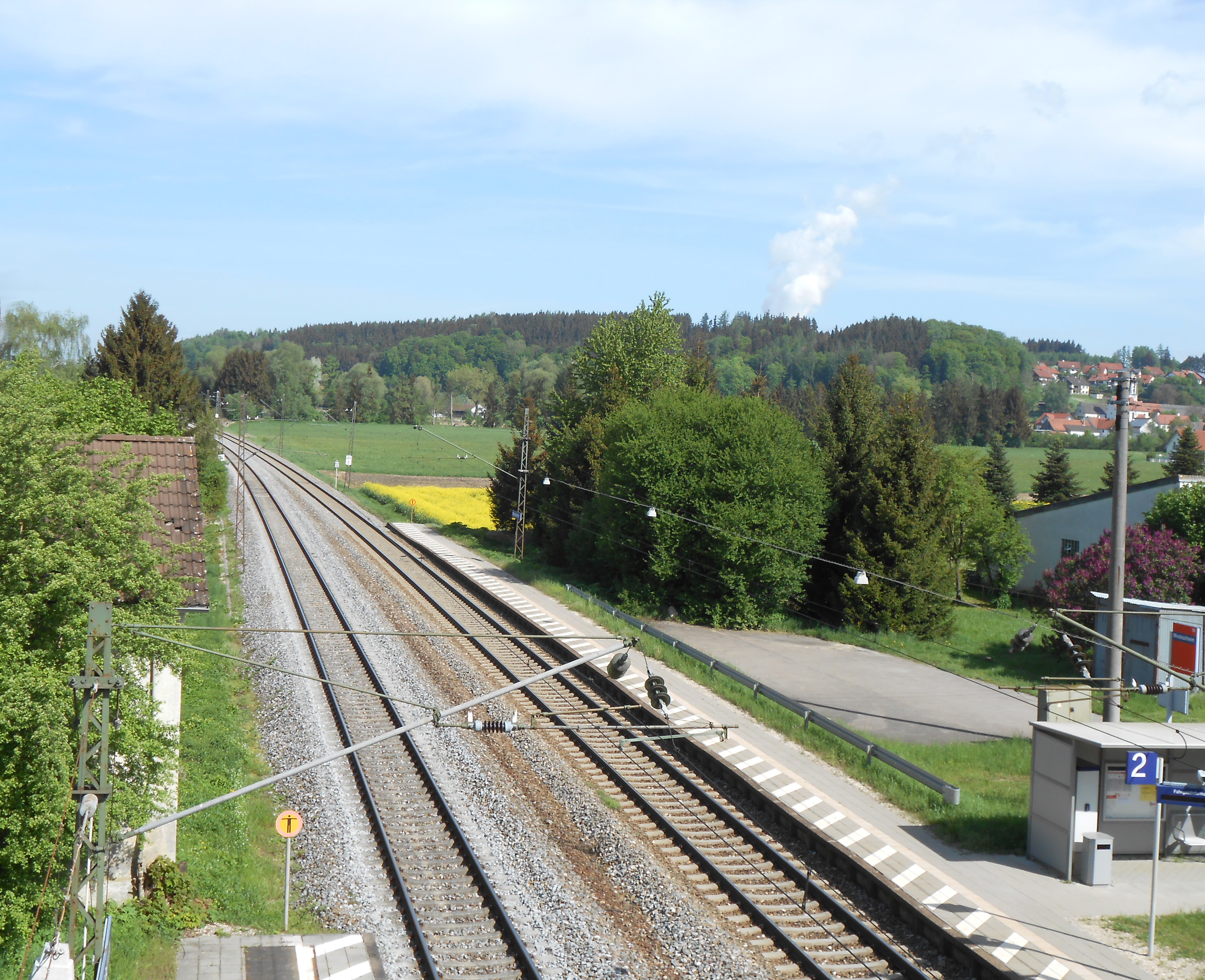 Blick von der Bahnbrücke hinunter zum Haltepunkt Mindelaltheim sowie auf die Bahngleise, die hinter einer Kurve in Richtung Offingen verschweinden.Im Hintergrund befindet das Kernkraftwerk Gundremmingen und (am rechten Bildrand) der Ort Mindelaltheim.